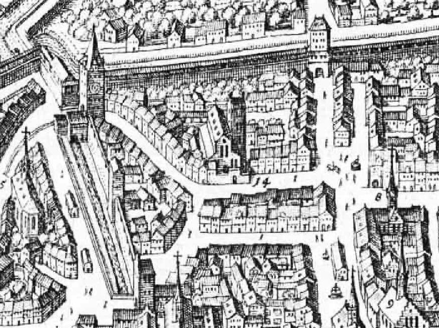 Konstanz in der Topographia Sueviae von Matthäus Merian. Ausschnitt mit der Paulskirche (Nr. 14)